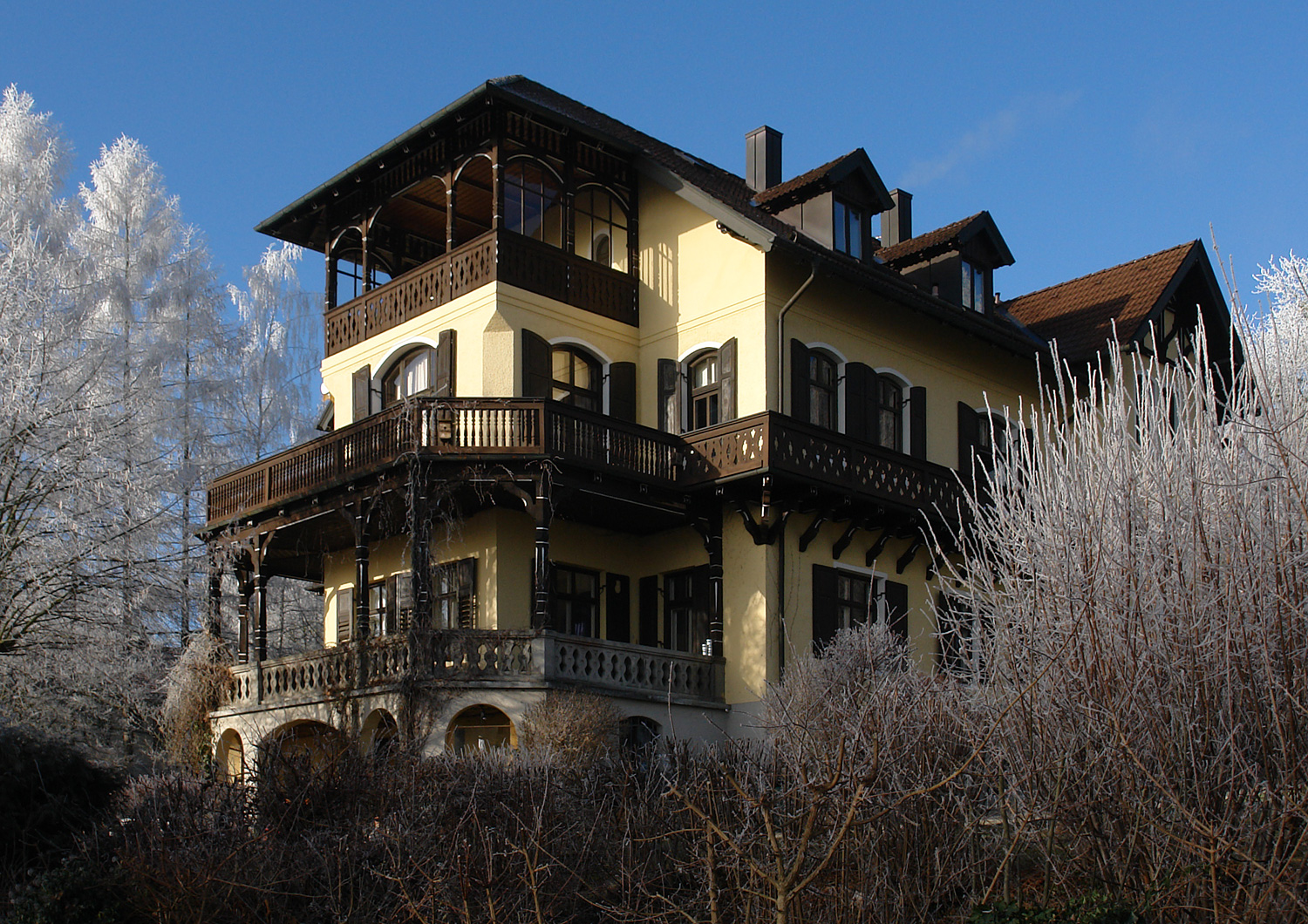 Feldafing: Villa an der Pschorrstraße This is a photograph of an architectural monument.